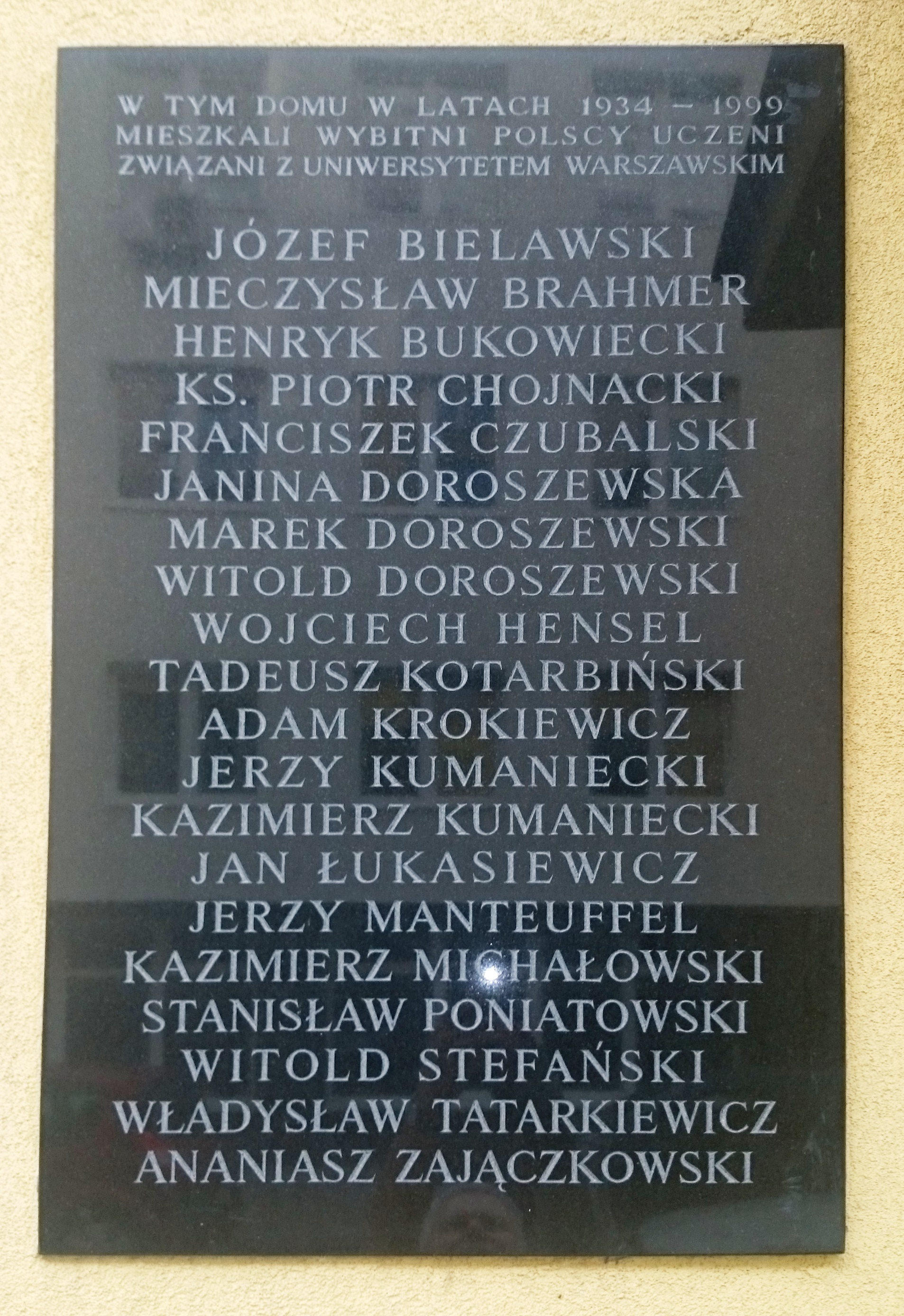 Tablica pamiątkowa powięcona mieszkańcom domu i członkom Stowarzyszenia Mieszkaniowego Spółdzielczego Profesorów Uniwersytetu Warszawskiego na elewacji domu przy ul. Sewerynów 6 w Warszawie